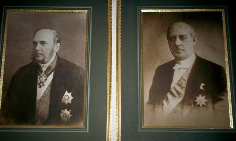 Отцы-основатели Гусь-Хрустального (Иван и Юрий Мальцовы)